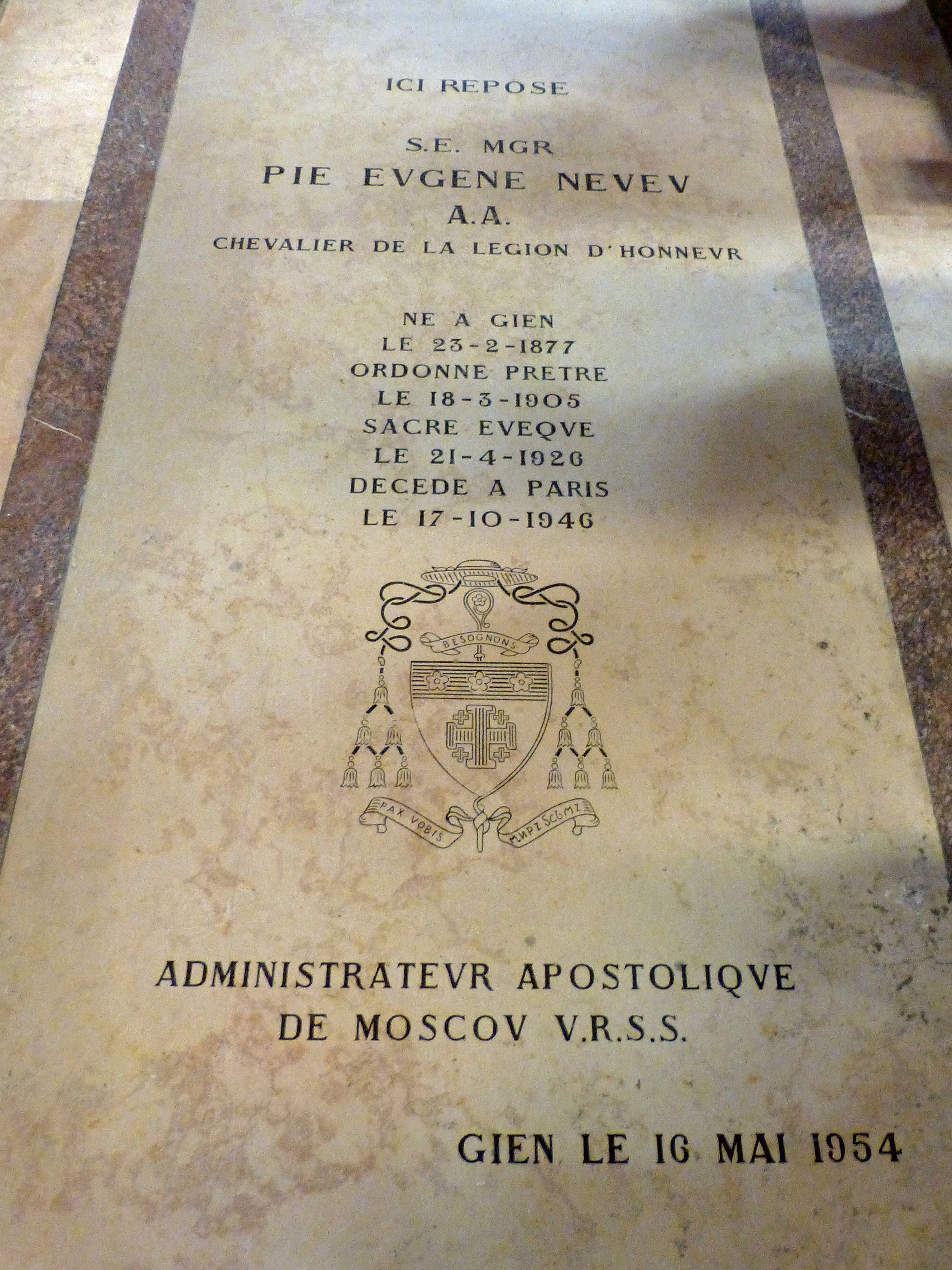 Gien (Loiret) : pierre tombale de Pie Eugène Neveu, évêque, à l'église paroissiale Sainte-Jeanne d'Arc